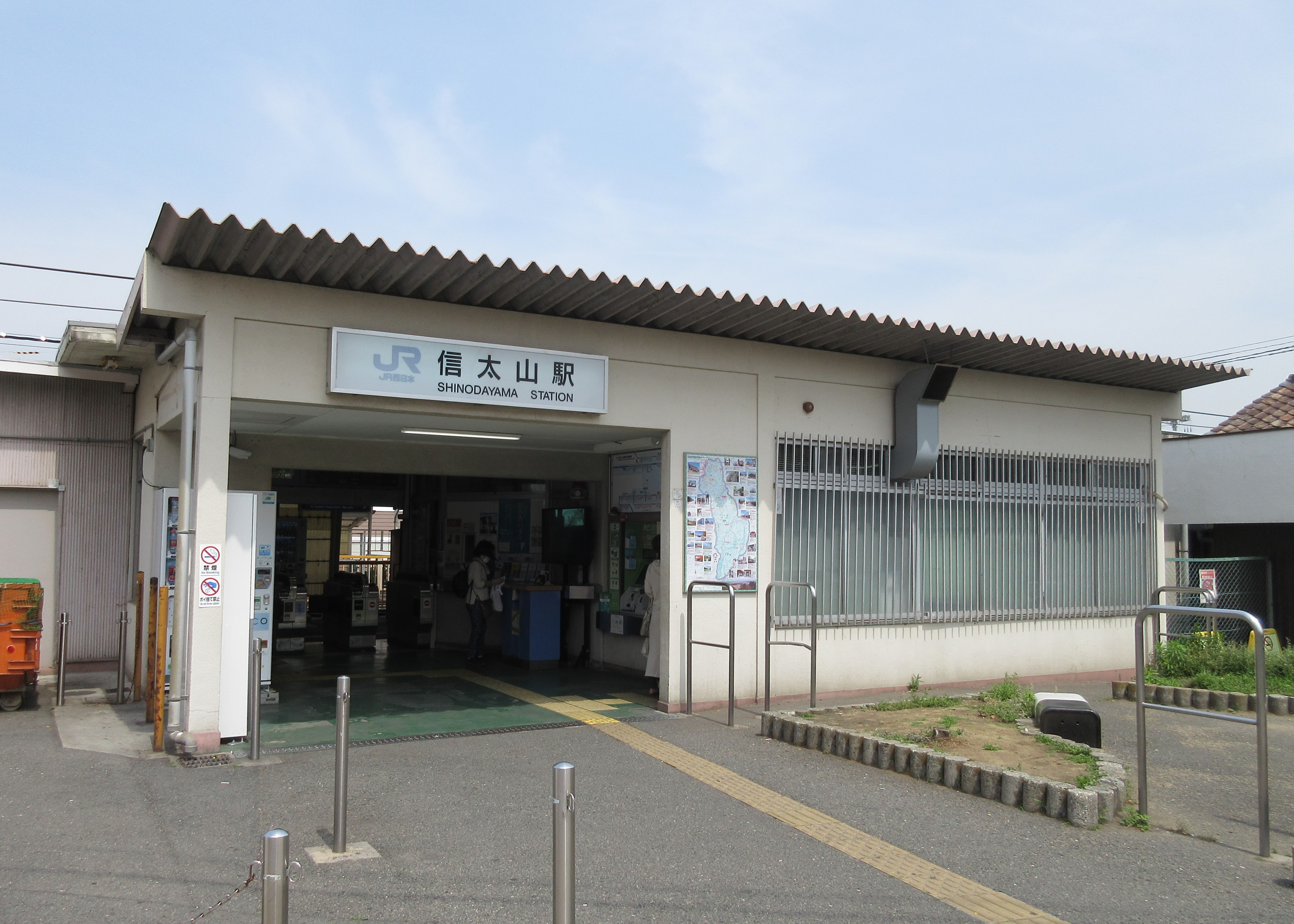 JR信太山駅